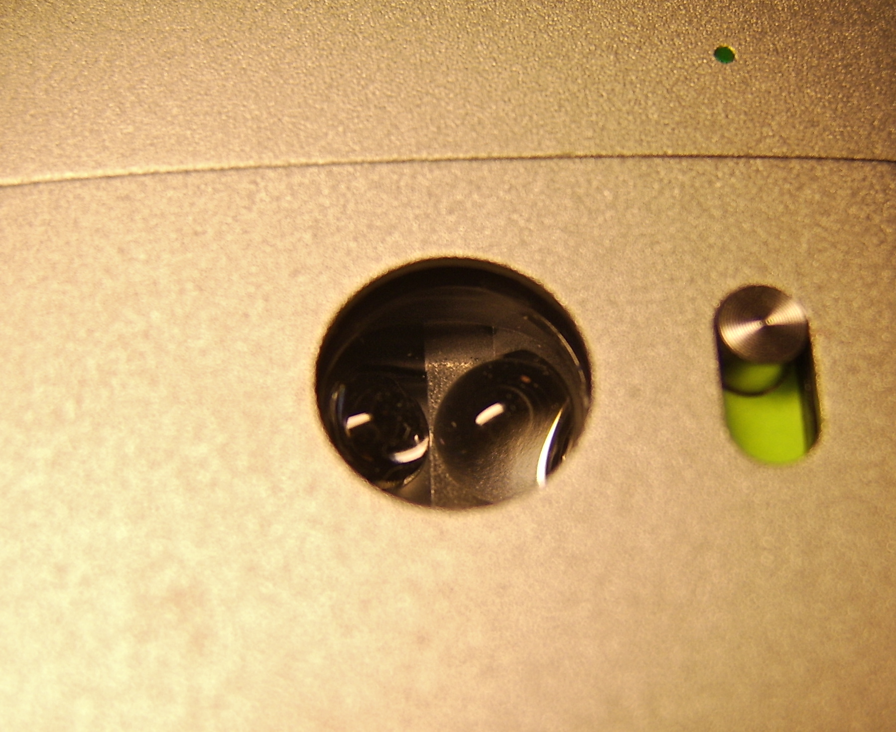 Magic Mouse'i sensor